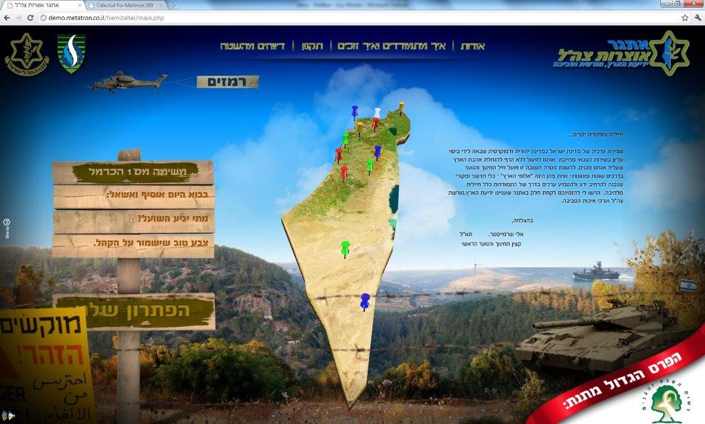 מיצג של חמיצר חידון צה"ל